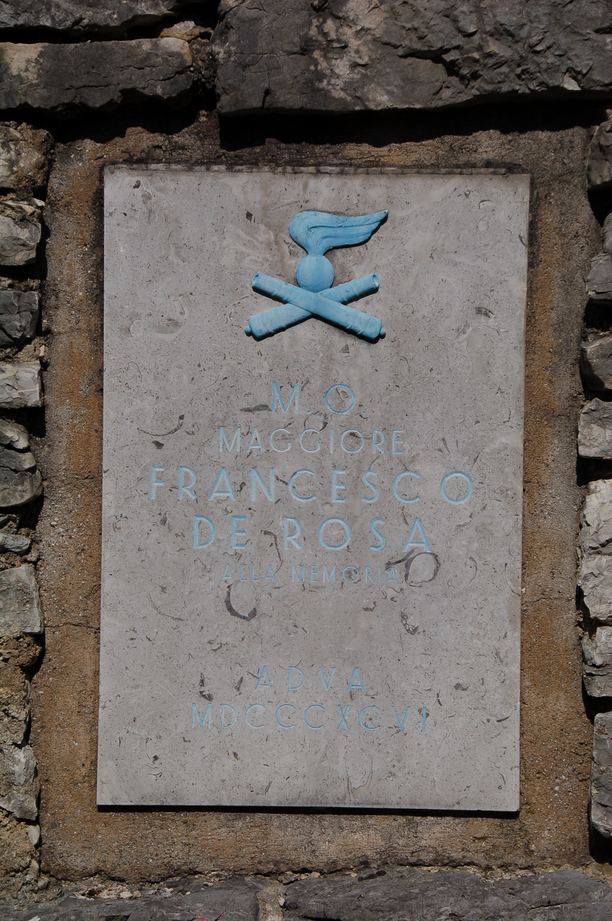 Lapide situata sulla Strada degli Artiglieri a Rovereto